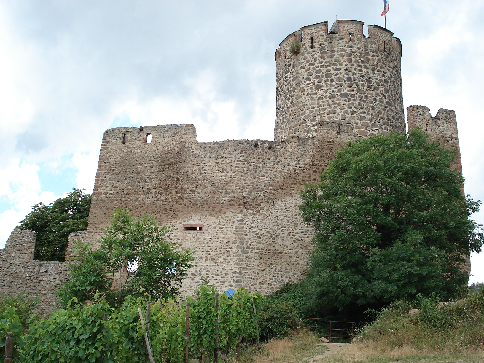 Kaysersberg, Alsace, dép. Haut-Rhin, France. Château.